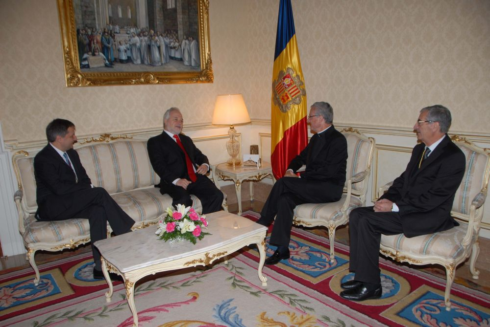 El Embajador del Perú, Francisco Eguiguren Praeli, presentó el pasado 25 de octubre las Cartas Credenciales que lo acreditan como Embajador Extraordinario y Plenipotenciario en el Principado de Andorra. La ceremonia de presentación tuvo lugar ante el Co-príncipe Episcopal de dicho Principado, Su Excelencia Joan-Enric Vives, en el Palacio de La Seu D´Urgel. Posteriormente, el Embajador peruano mantuvo una reunión con el Co-príncipe Episcopal; el Ministro de Asuntos Exteriores de Andorra, Gilbert Saboya Sunyé; y el Representante personal del Co-Príncipe en el Principado de Andorra, José María Mauri, donde transmitió el saludo del Presidente de la República, Ollanta Humala, y resaltó las excelentes relaciones de amistad y cooperación existentes entre el Perú y Andorra.